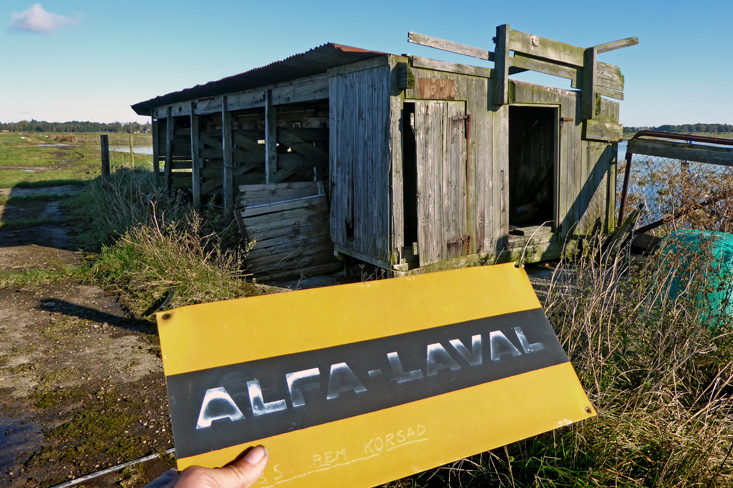 Ett gammalt nerlagt mjölkstall med pumpar och separator från Alfa-Laval. Det kunde mjölkas 10 kor på en gång, stallet lades ner ca 1975. Bilden tagen 10 oktober 2017 på Öja mosse i Ystad.